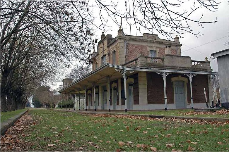 Estación Patricios del Ferrocarril General Manuel Belgrano (Argentina), ex Compañía General de la Provincia de Buenos Aires (CGBA).